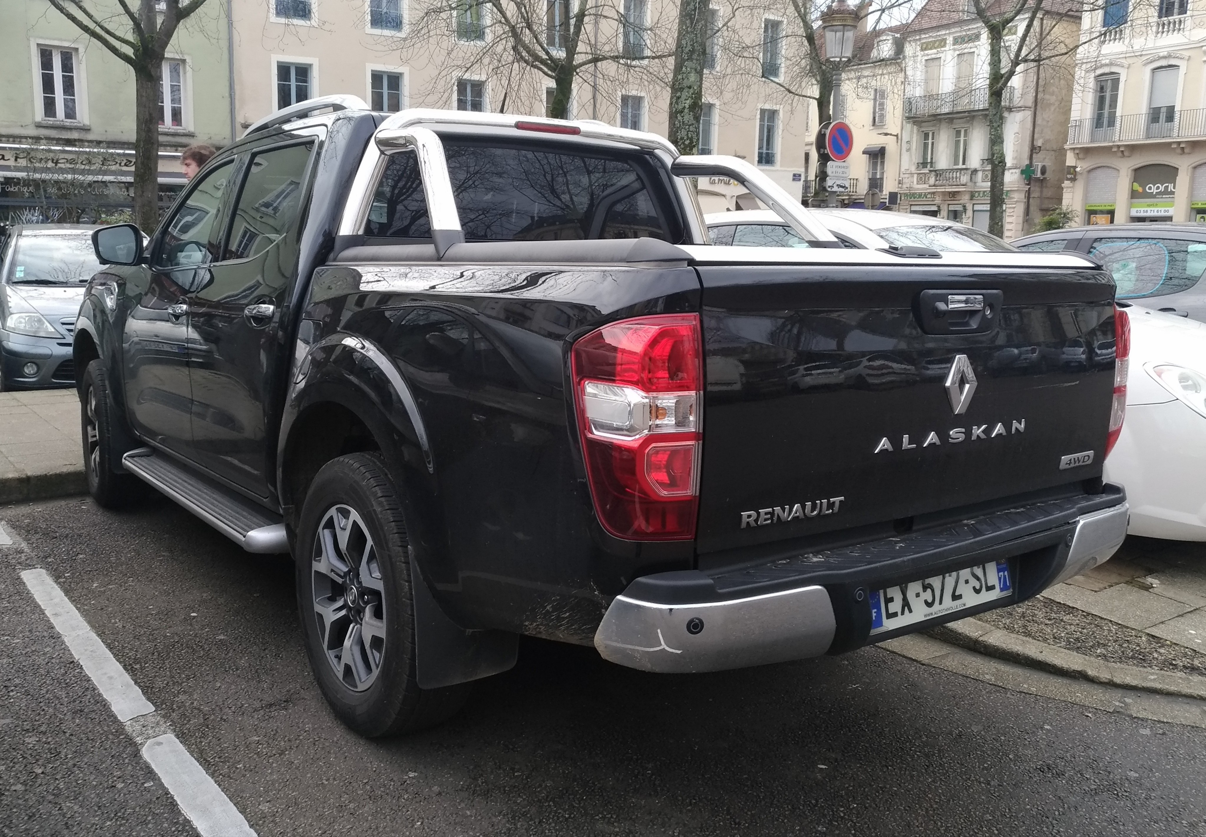 2018 Renault Alaskan (2.3 dCi 190 hp) at Chalon sur Saone